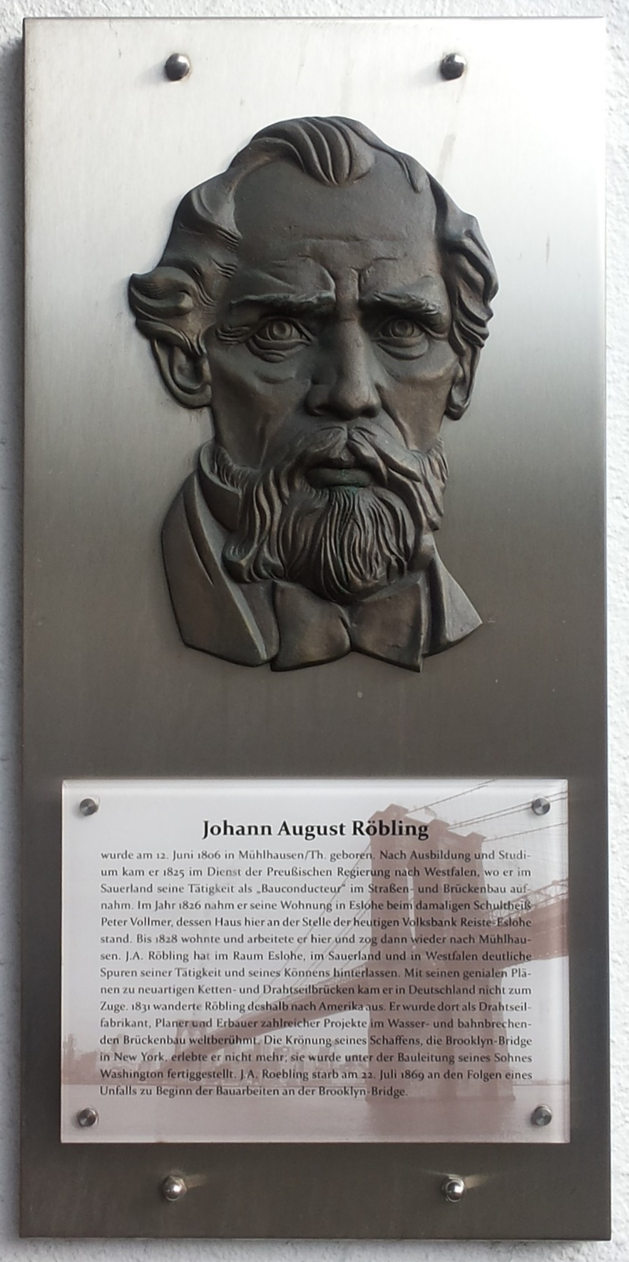 Gedenk- bzw. Hinweistafel Johann August Röbling an der Volksbank in Eslohe (Germany)